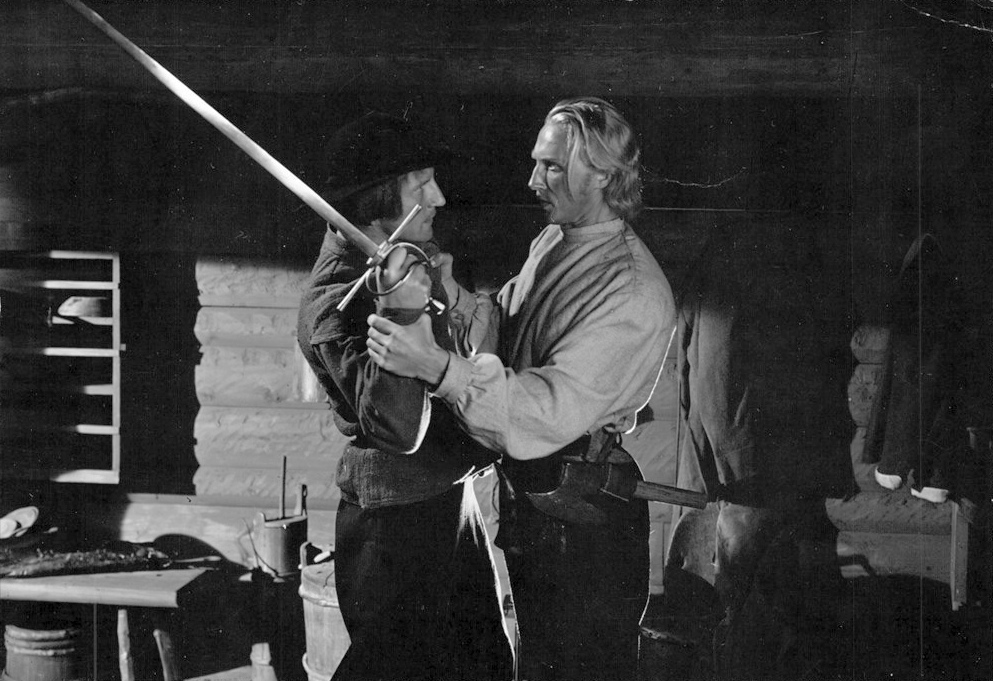 "Rid i natt", 1942. Oscar Ljung